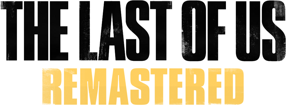 Logo du jeu vidéo The Last of Us Remastered, développé par Naughty Dog sortie en 2014.